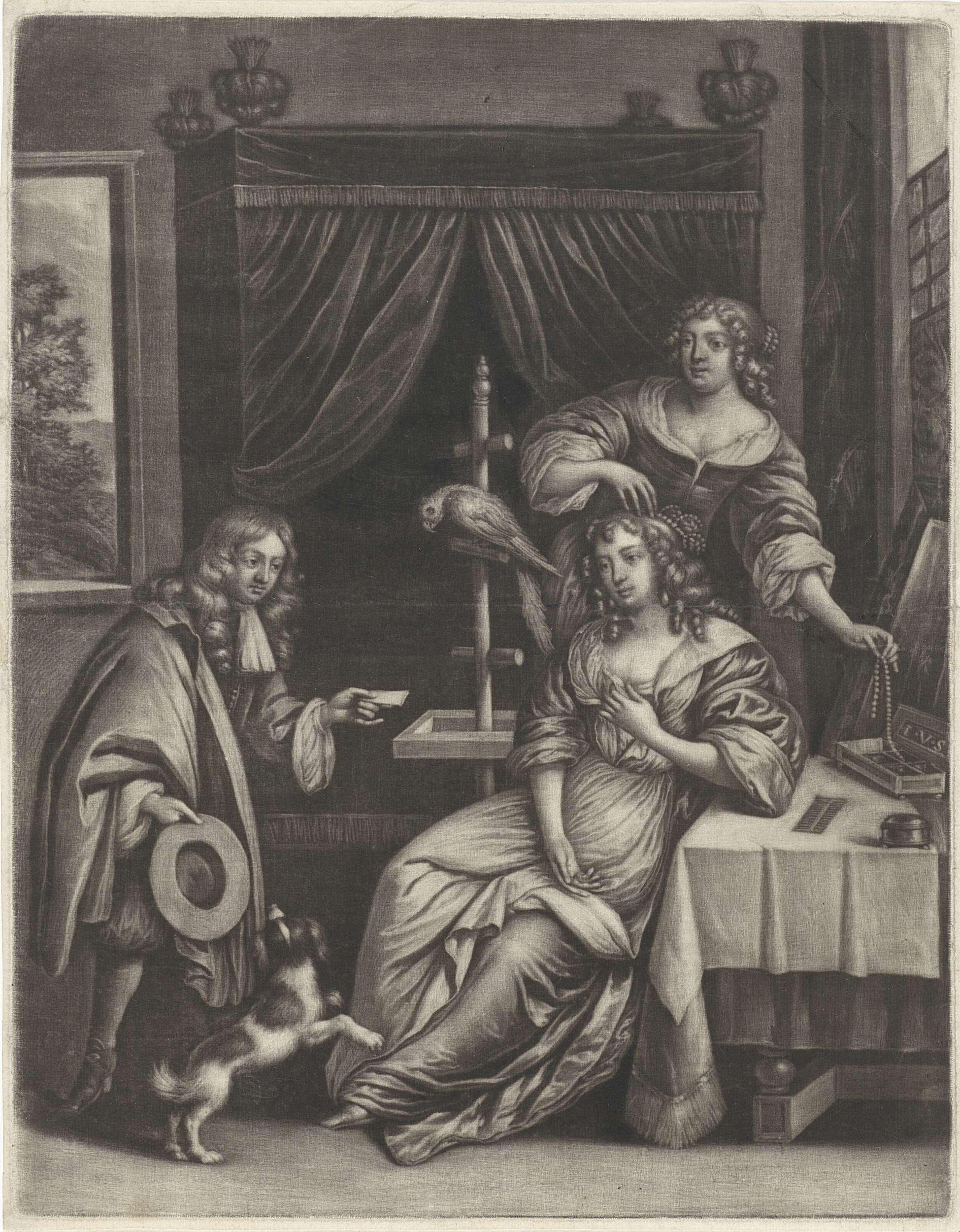 Een man reikt een brief aan, aan een vrouw die gekapt wordt. Naast de kaptafel een papegaai op een stok.; Iconclasscode: 46E221; Iconclasscode: 34B11; Iconclasscode: 25F35(PEACOCK); Iconclasscode: 41D2661(+82); print